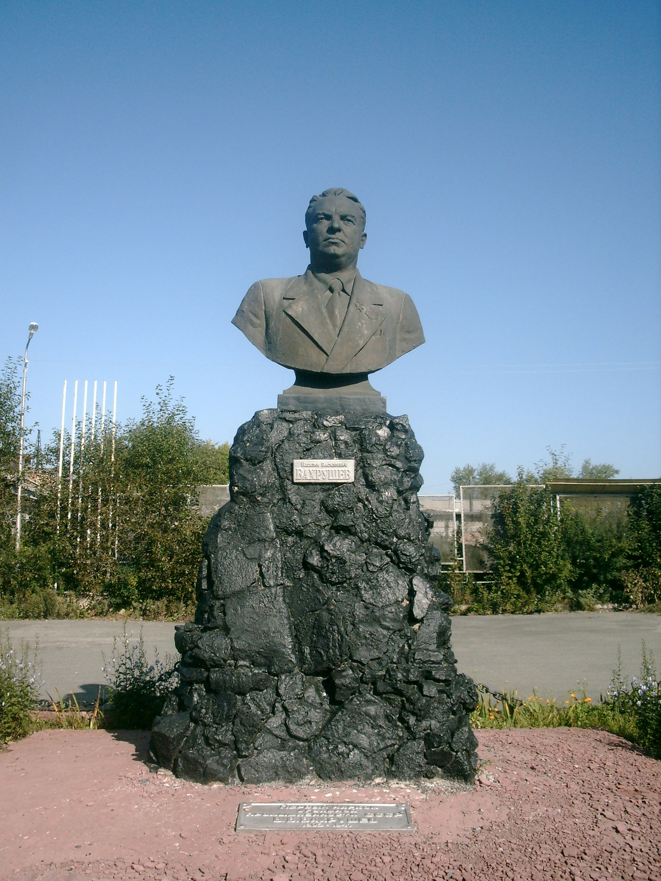 Памятник-бюст Василию Васильевичу Вахрушеву в городе Карпинске. Скульптор – Н. В. Томский. Установлен в 1948 году.